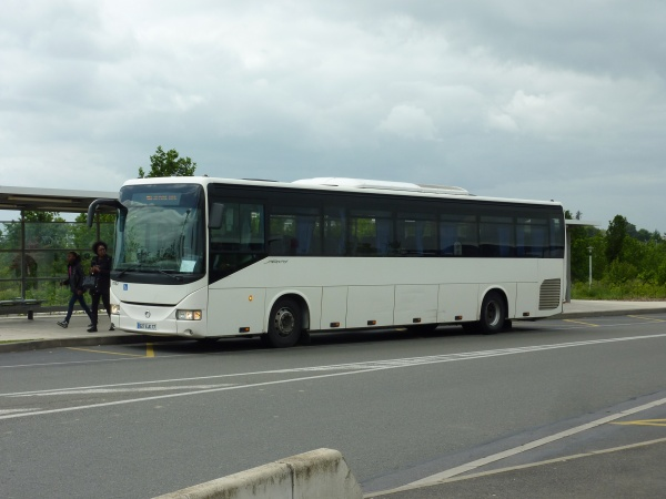 Arway du réseau Sénart Express à la gare de Lieusaint-Moissy